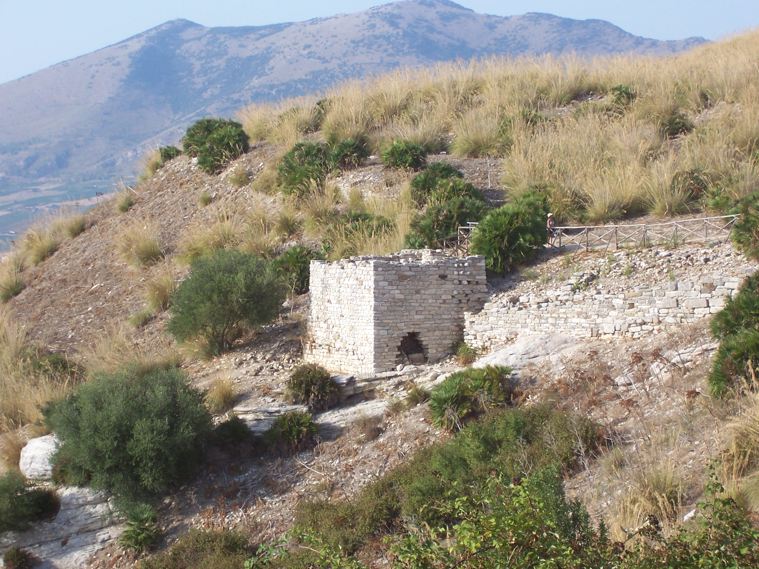 Segesta